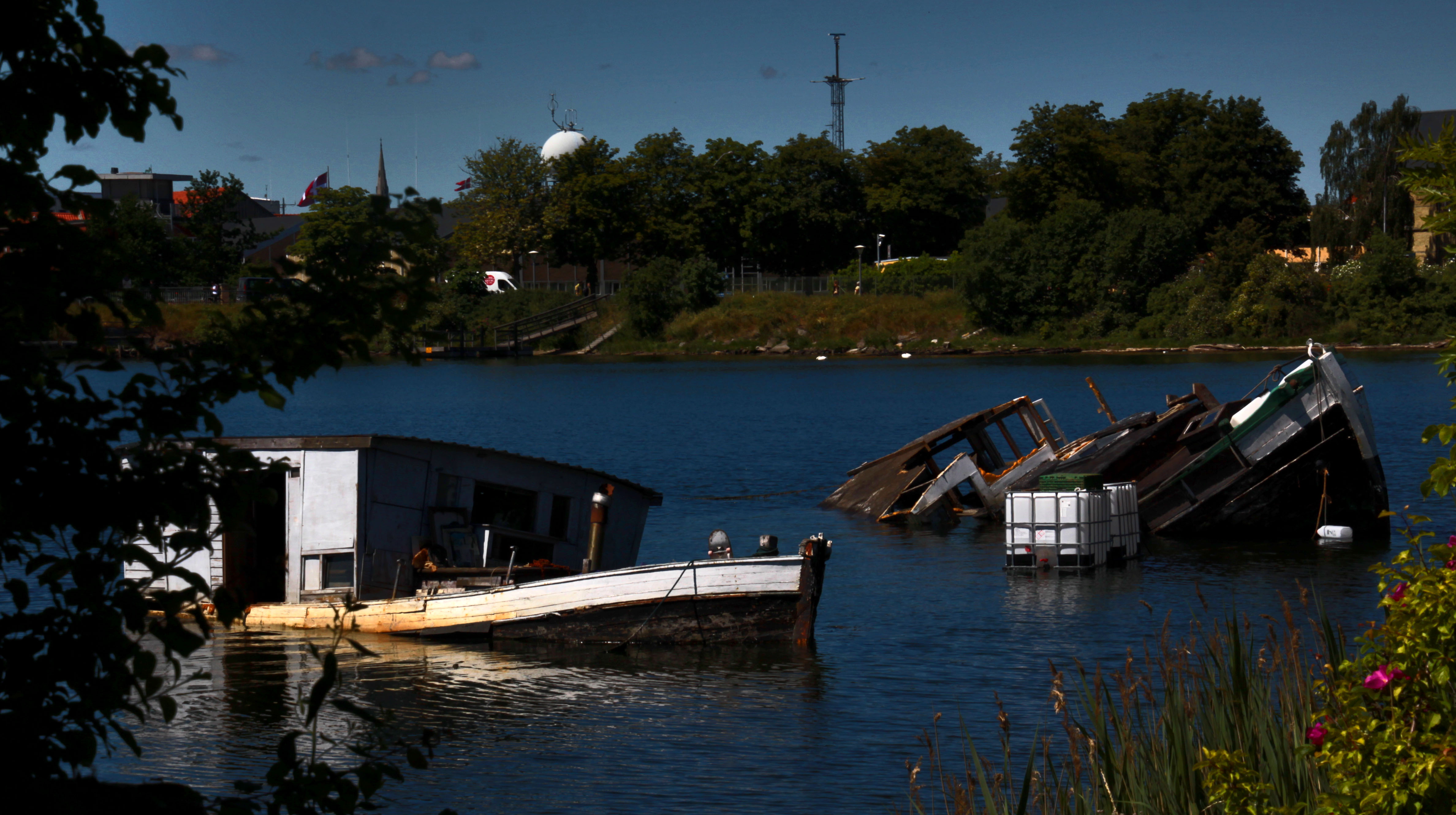 København / Copenhagen. Längs Refshalevej.